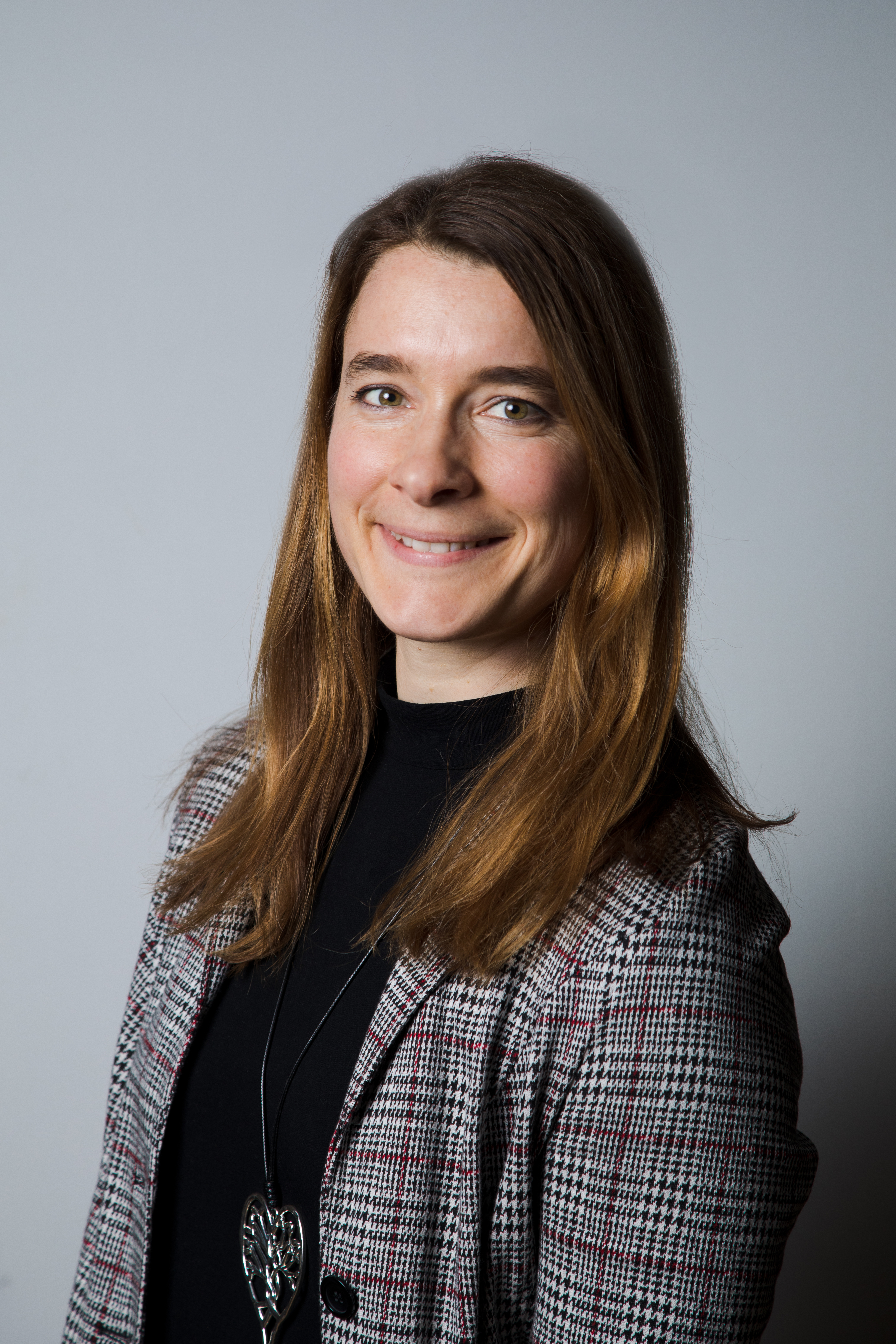 Ingrid Krawarik